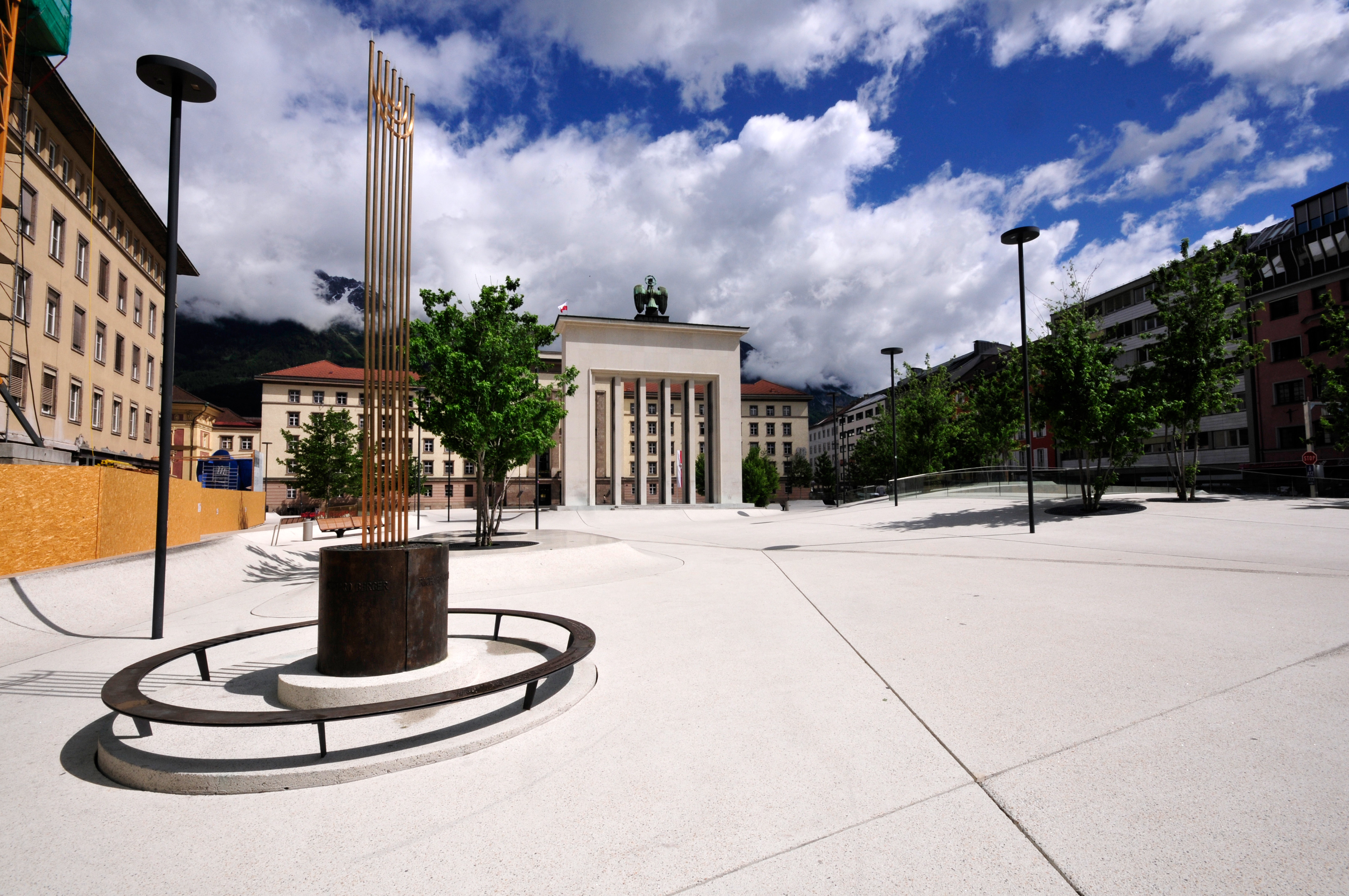 Landhausplatz Innsbruck This media shows the remarkable cultural object in the Austrian state of Tyrol listed by the Tyrolean Art Cadastre with the ID 14969. (More images on Commons) The making of this work was supported by Wikimedia Austria. For other files made with the support of Wikimedia Austria, please see the category Supported by Wikimedia Österreich. Im Rahmen des Fußballländerspiels Österreich gegen Rumänien bin ich einige Stunden durch Innsbruck gefahren und habe Aufnahmen gemacht, die vielleicht mal gebraucht werden könnten. --Ralf Roleček 11:20, 10 June 2012 (UTC) The making of this work was supported by Wikimedia Austria. For other files made with the support of Wikimedia Austria, please see the category Supported by Wikimedia Österreich.